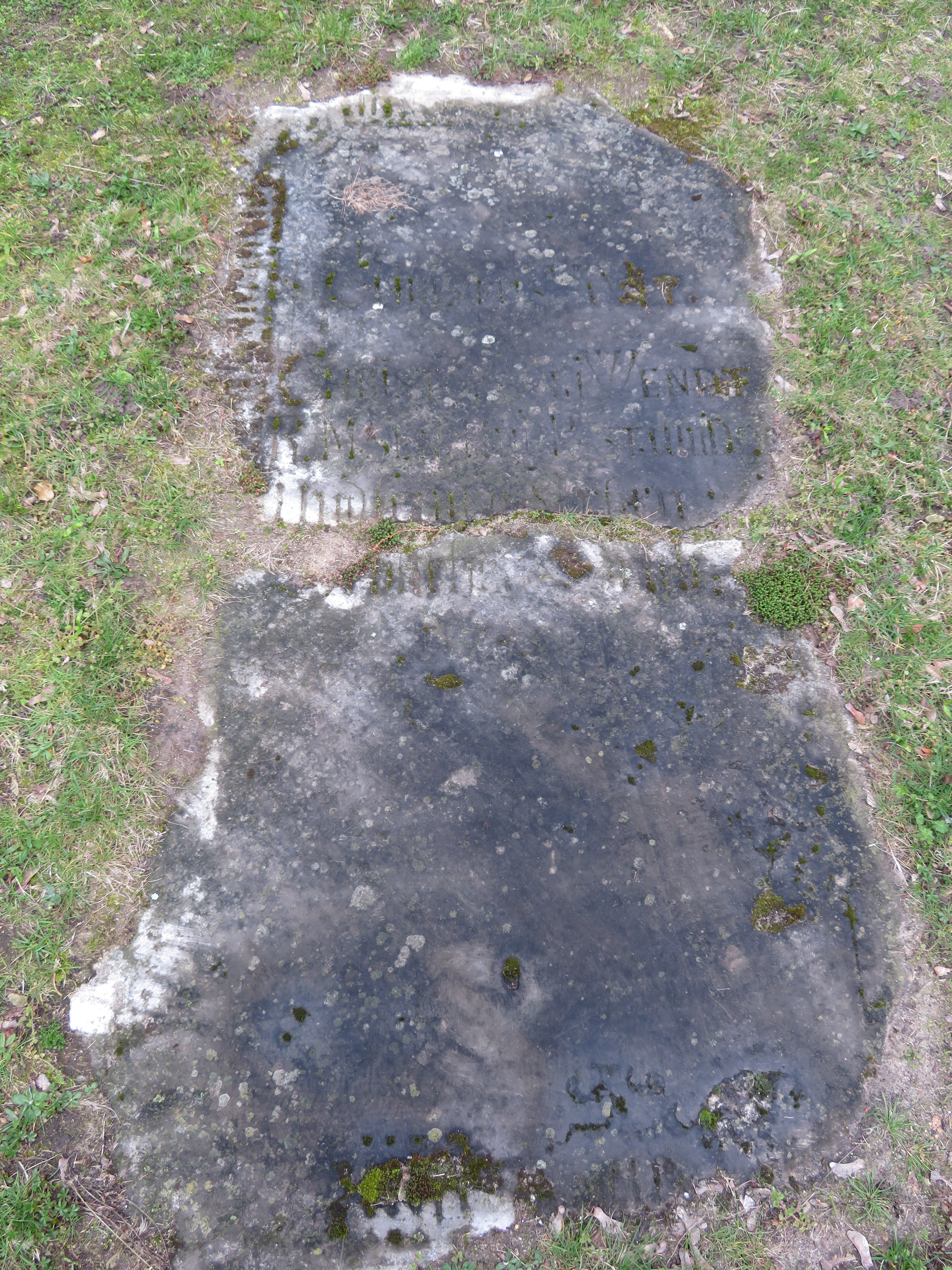 Grabplatte von Christoph Wendt aus dem Dom zu Lübeck; sie befindet sich seit der Zeit des Wiederaufbaus nach dem Zweiten Weltkrieg im Rasen südlich des Domchors und ist zerbrochen.Klaus Krüger: Corpus der mittelalterlichen Grabdenkmäler in Lübeck, Schleswig, Holstein und Lauenburg 1100-1600, Jan Thorbeke Verlag, Stuttgart 1999, S. 666 LÜDO252